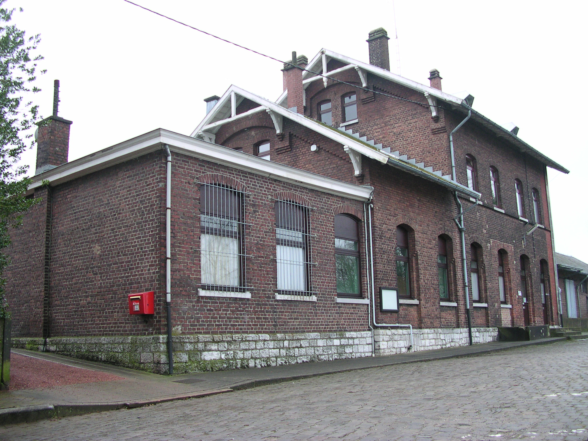 Bahnhof Raeren, Vorderseite